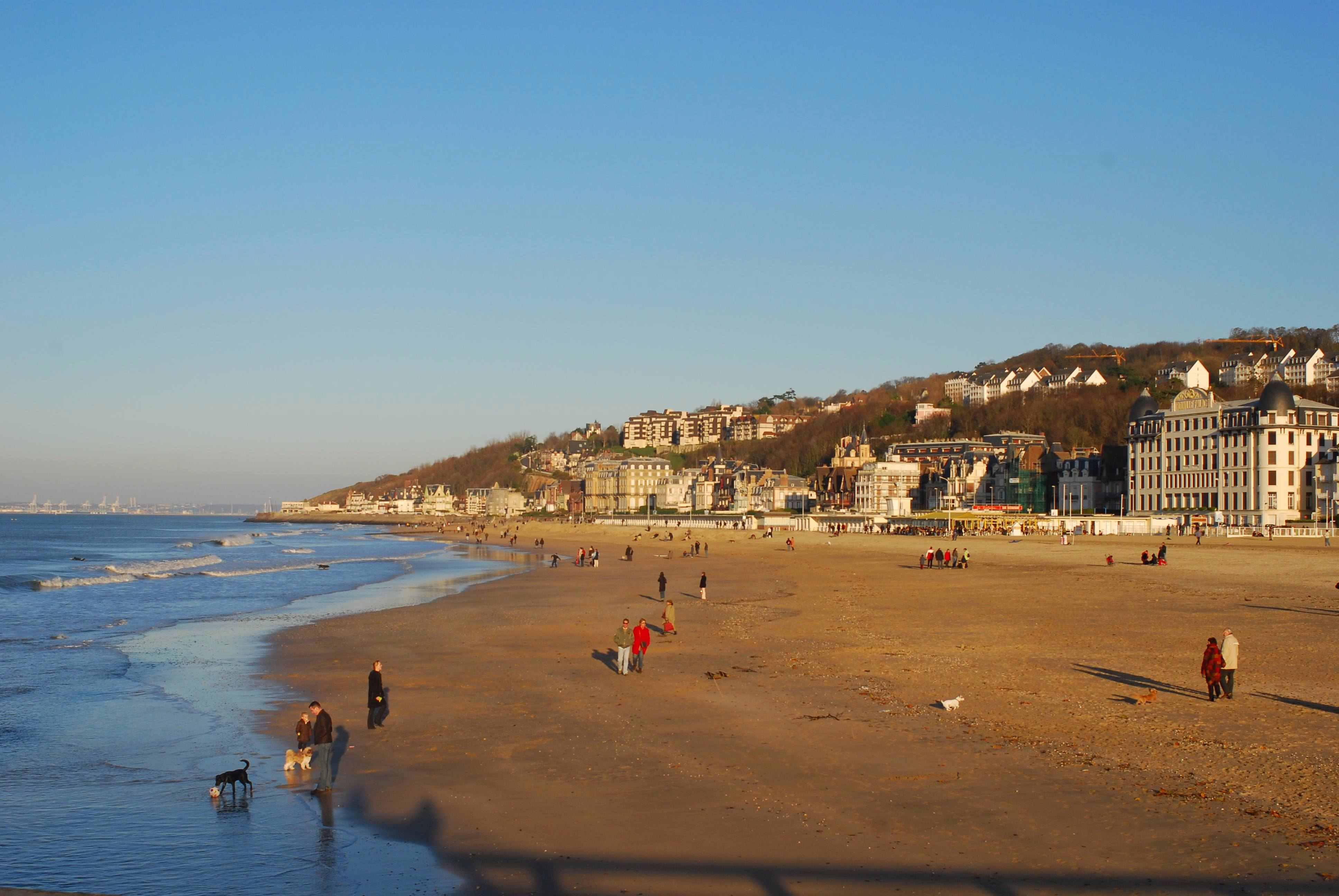 Plage de Trouville ; novembre 2006